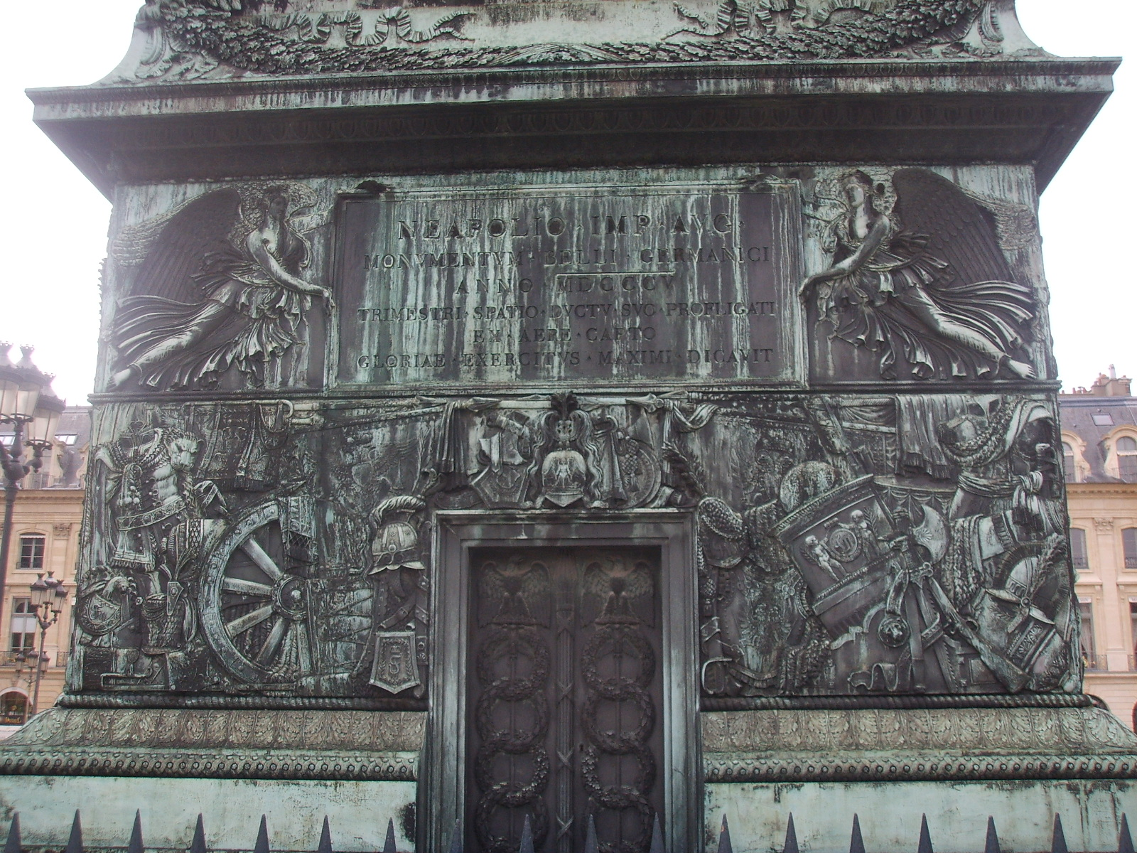 Lorenzo Bartolini, Rilievo alla base della Colonna dell'armata (1805), in Place Vendôme a Parigi.